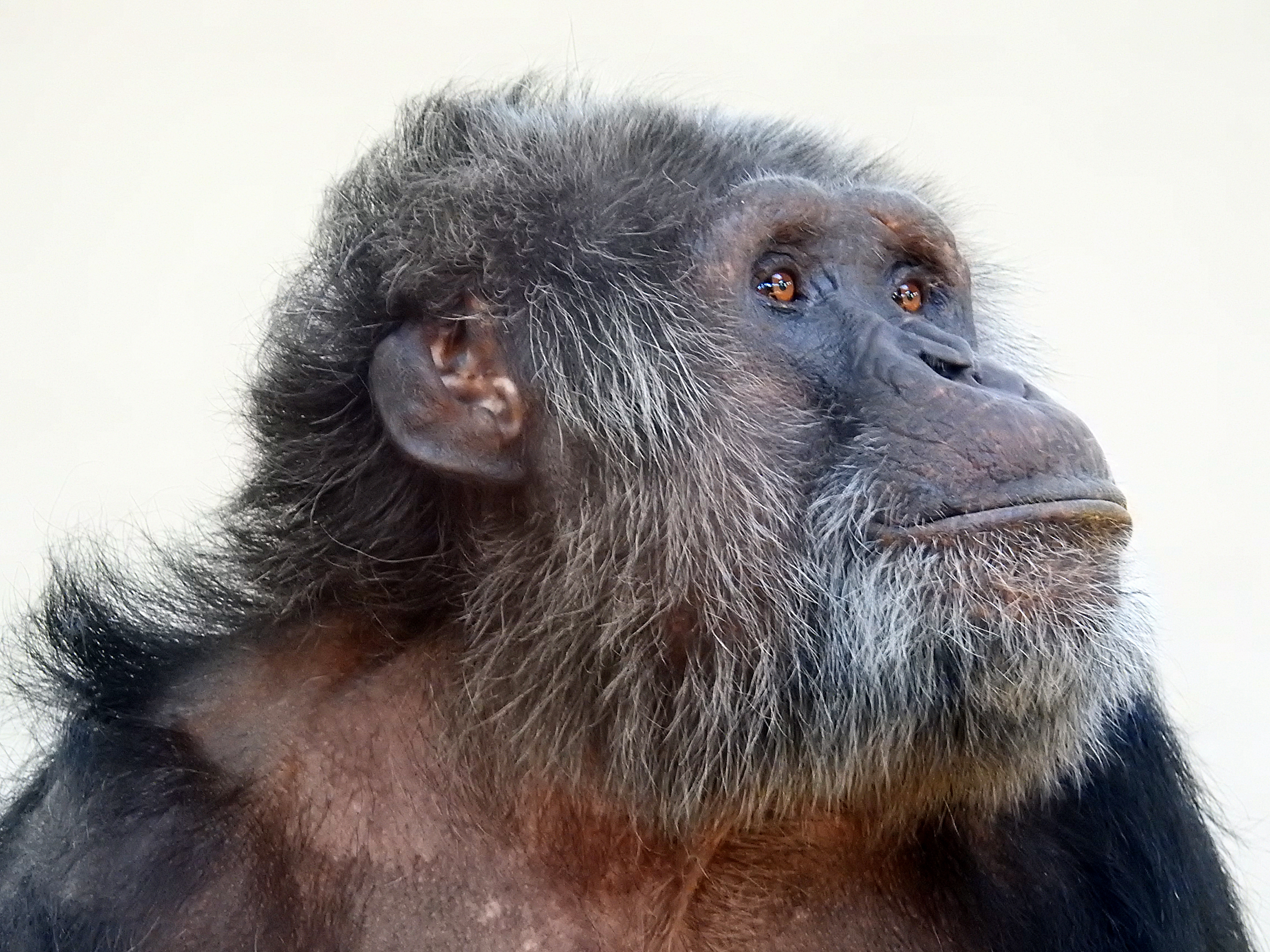 Chimpansee